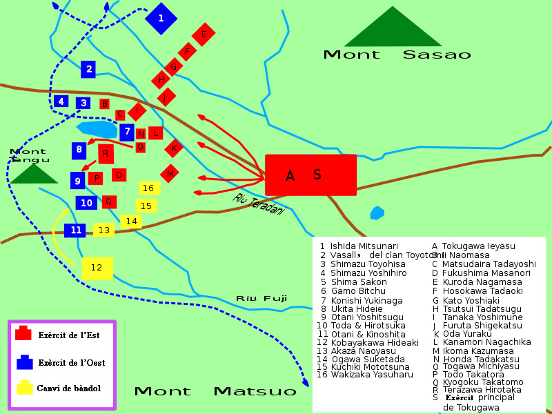 posició estratègica de les tropes durant la batalla